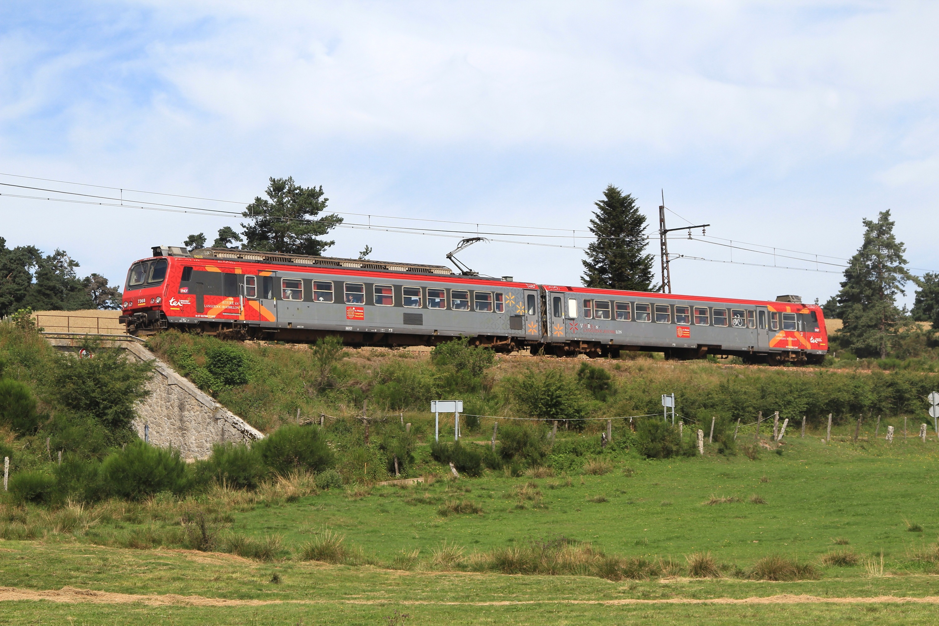 L'unique TER impair journalier (n° 878957 Saint-Chély - Béziers) près de la gare d'Aumont-Aubrac assuré par une Z 7300.